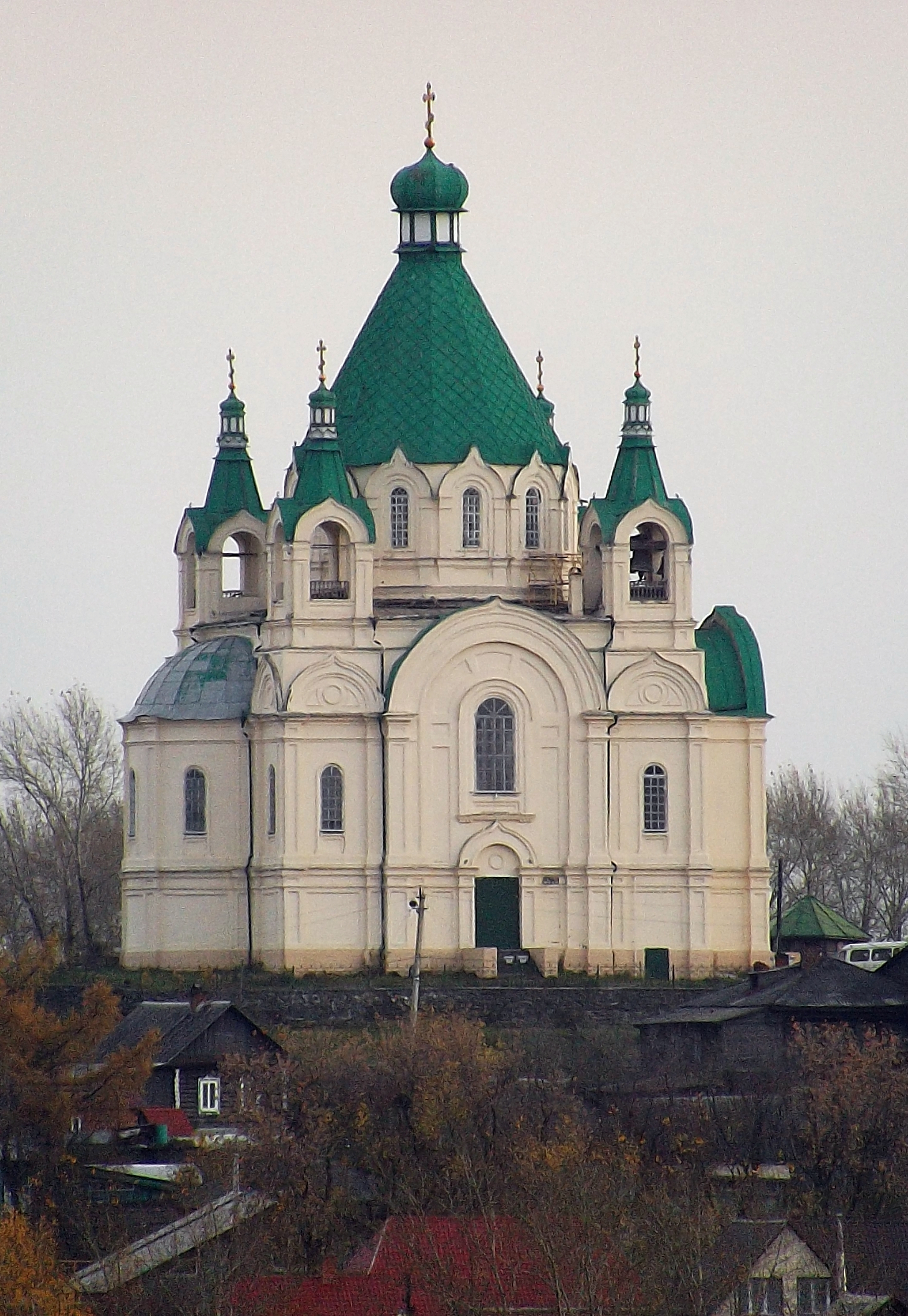 Церковь Александра Невского: улица Совхозная, 5, Нижний Тагил, Свердловская область